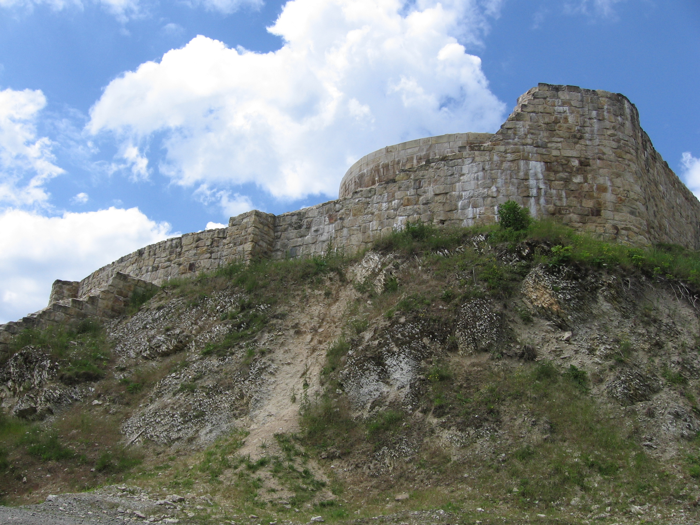 Burgruine Falkenburg in Detmold/Berlebeck im Juni 2012 This is a photograph of an architectural monument.